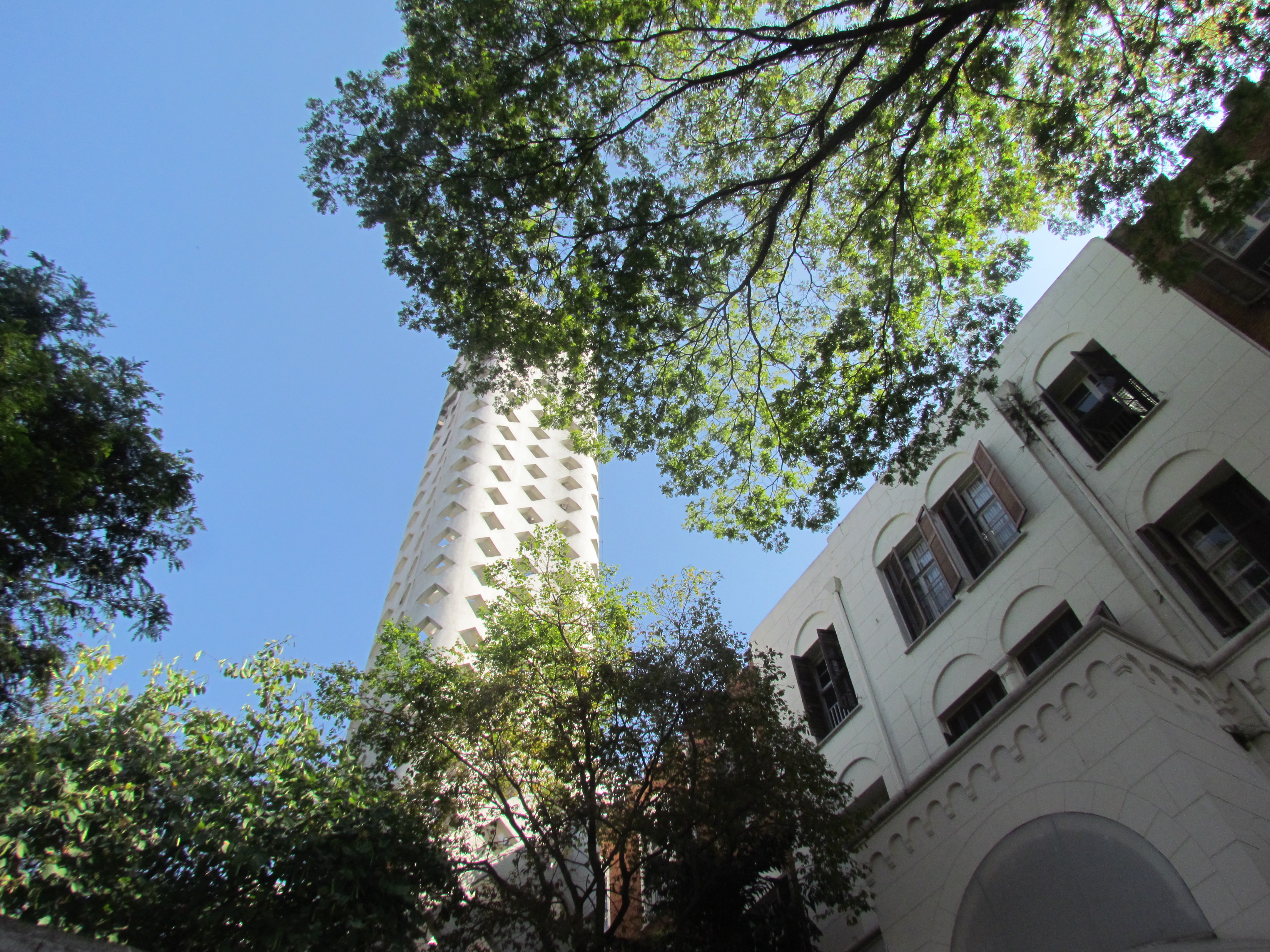 Torre da Igreja de São Domingos, em São Paulo (SP), Brasil.